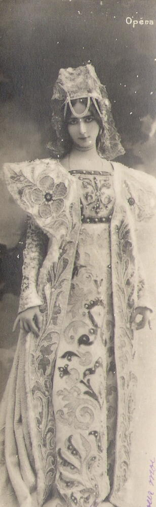 Postcard of Cléo de Mérode